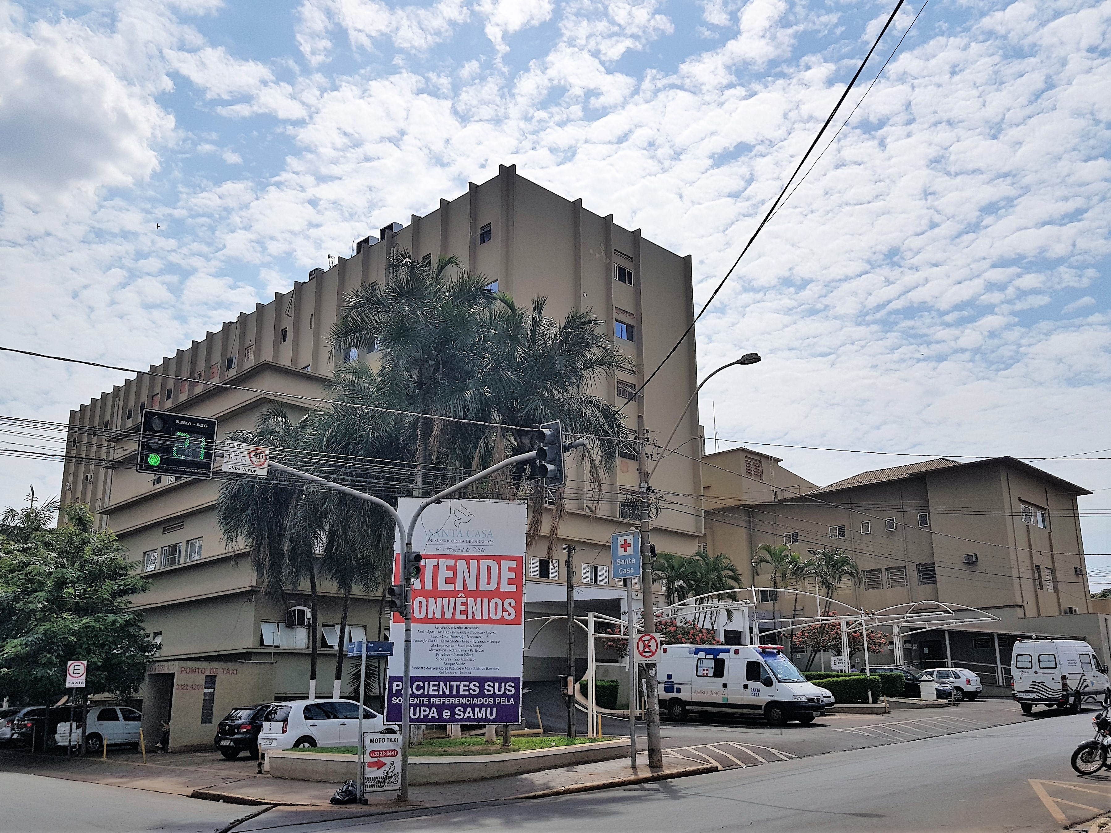 Vista lateral da Santa Casa de Misericórdia de Barretos